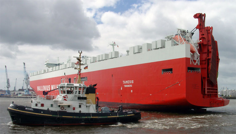 Der Hafenschlepper Michel dreht den Ro-Ro-Frachter Tamesis aus Tønsberg, von der Reederei Wallenius Wilhelmsen, auf der Norderelbe, um ihn in den Moldauhafen zu bugsieren. Aufnahmeort: Hafen Hamburg, Norderelbe südlich des Geländes der Hafencity Michel IMO Number: 9166534 MMSI Number: Callsign: DGMS Length: 30 m Beam: 11 m Tamesis IMO-Nummer: 9191307 MMSI-Nummer: 257565000 Rufzeichen: LAOL5 Länge: 240 m Breite: 32 m Information about Michel may be found at IMO 9166534. A ship can change her name and flag state through time, but the IMO number remains the same through the hull's entire lifetime. Therefore, it's useful to identify a ship through her IMO number. Information about Tamesis may be found at IMO 9191307. A ship can change her name and flag state through time, but the IMO number remains the same through the hull's entire lifetime. Therefore, it's useful to identify a ship through her IMO number.